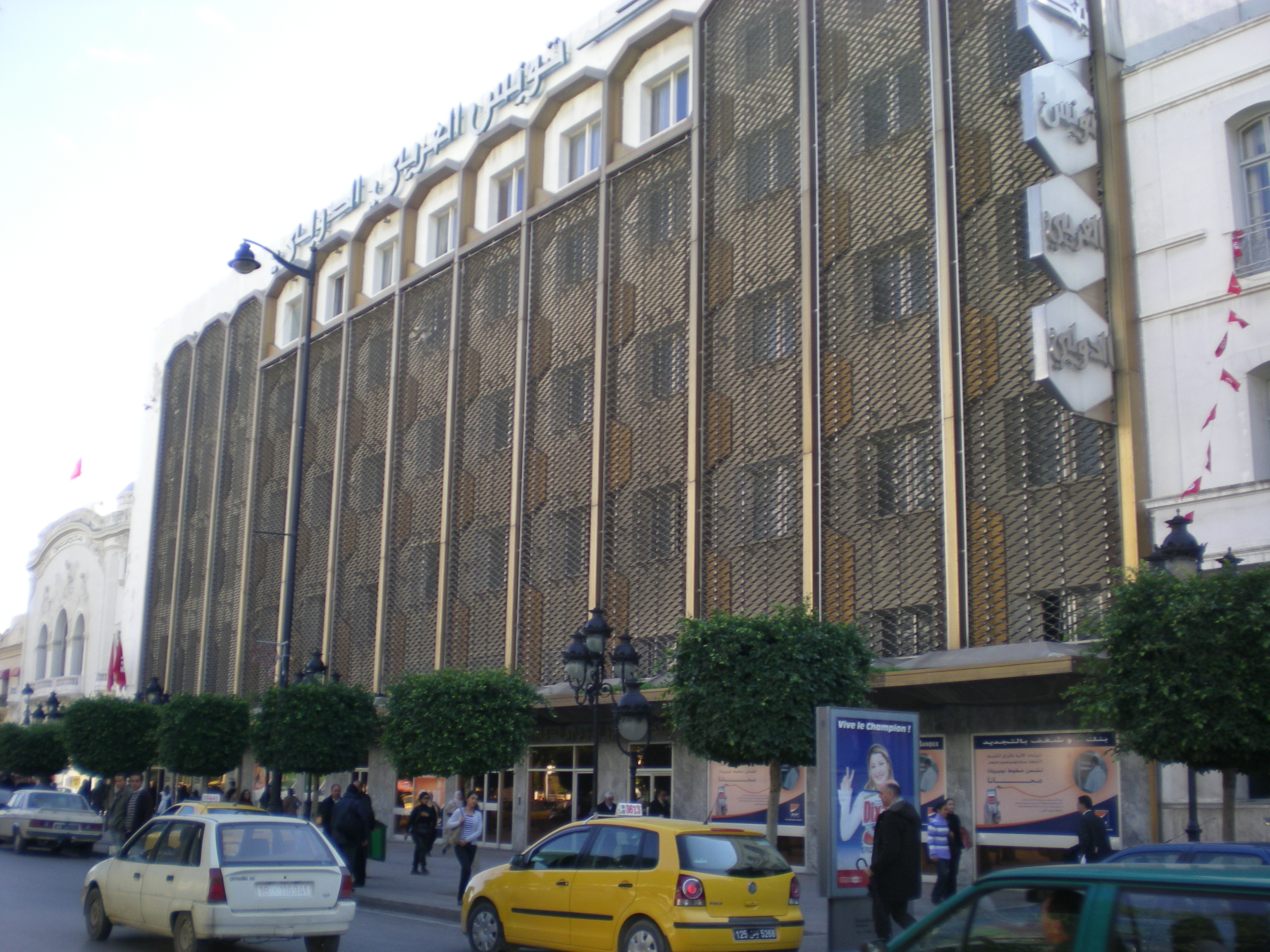 Siège Social de la BIAT, av de Bourguiba Tunis